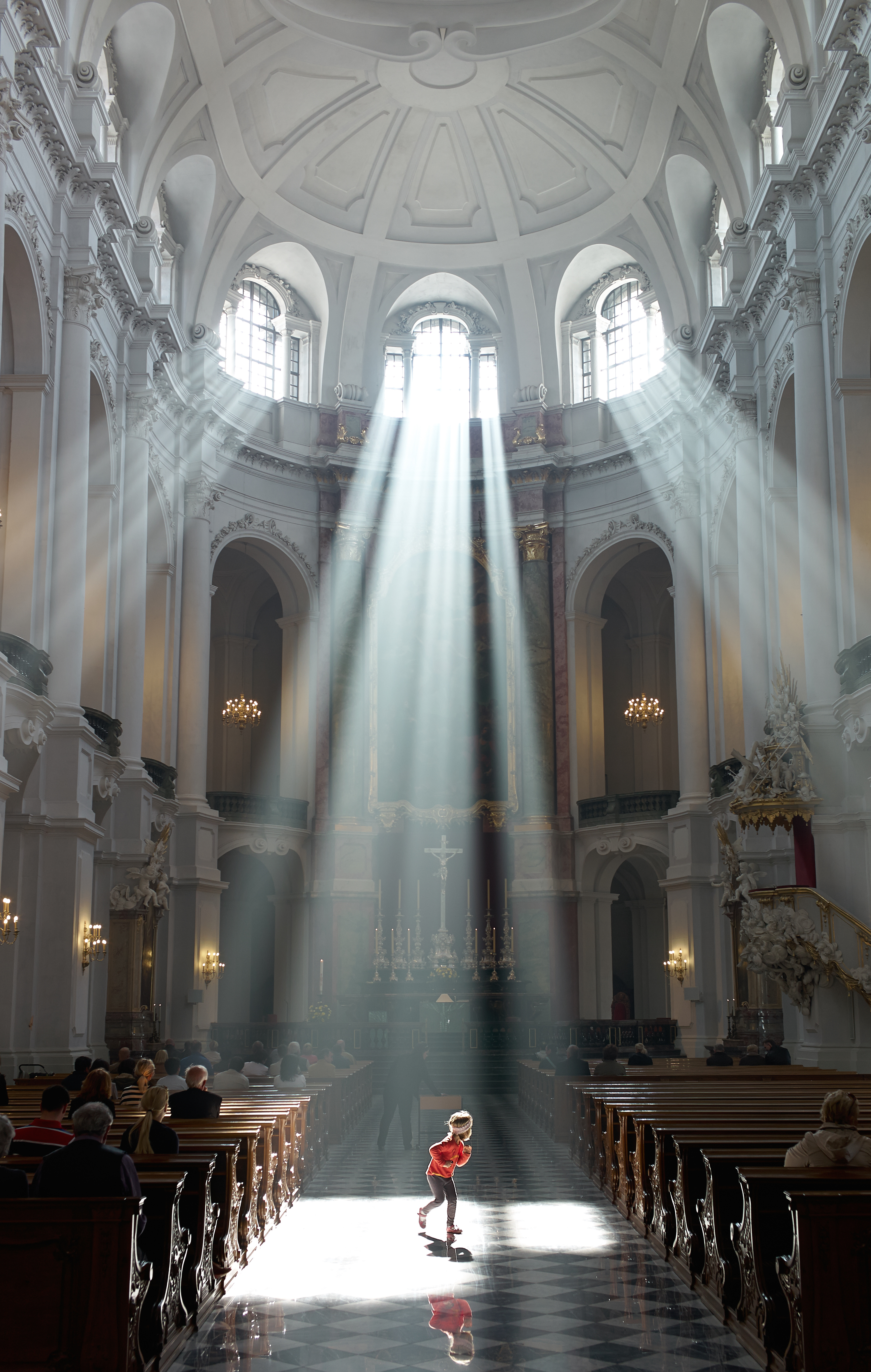 Hofkirche Dresden - Innenaufnahme mit intensiven Sonnenstrahlen und spielendem Kind